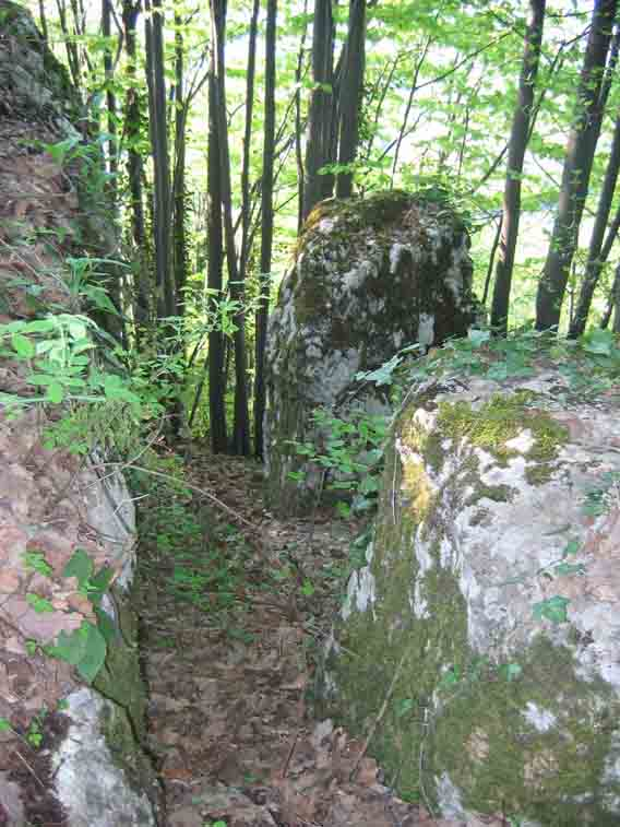 Остаци средњевјековног утврђења Јаблан град у Општини Угљевик. Аутор: Б. Марковић, 2006. година.